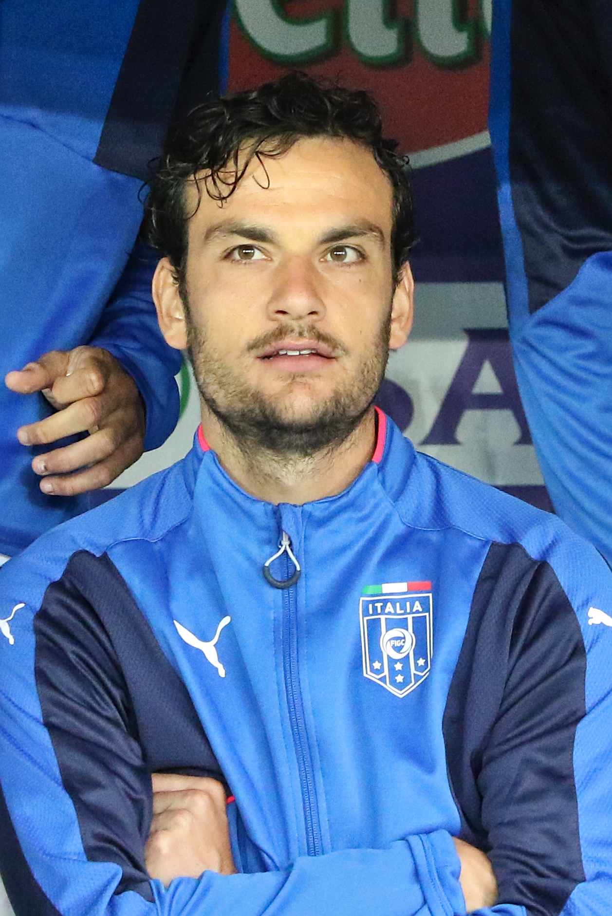 20150616 - Portugal - Italie - Genève - Marco Parolo